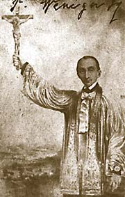 Franz Xaver Weninger, österreichischer Jesuitenmissionar und Schriftsteller in USA